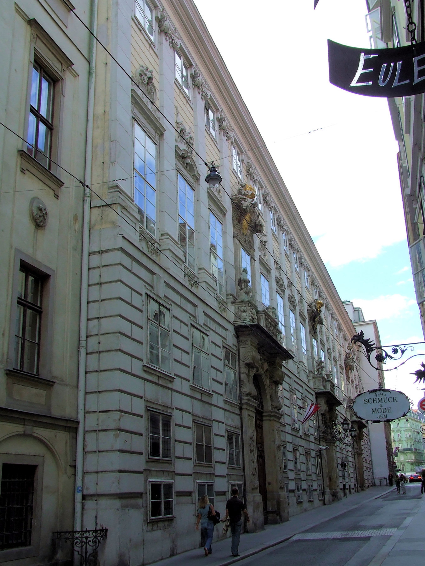 Stadtpalais des Prinzen Eugen. Heute Sitz des österreichischen Finanzministeriums (Himmelpfortgasse 8).